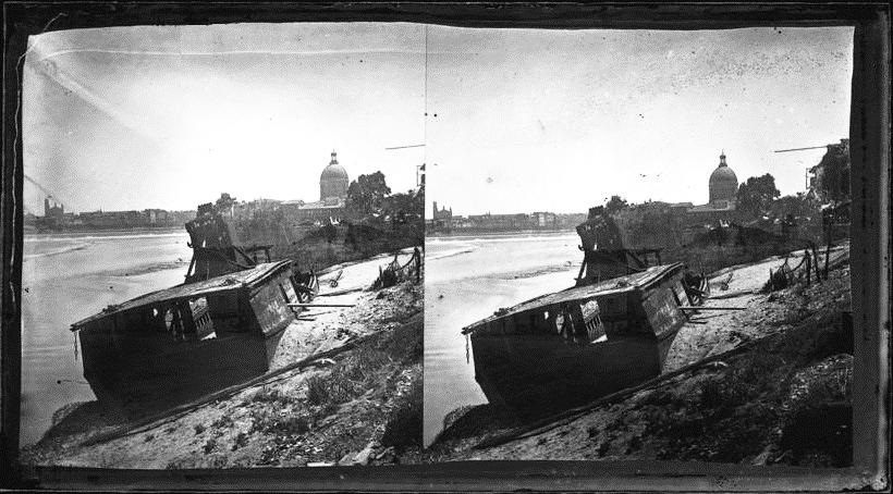 "en face du Bazacle". Rive gauche de la Garonne, à Bourrassol avant le canal de fuite. Juin 1875. Vue d'ensemble d'un bateau-lavoir échoué sur le bord du fleuve après l'inondation des 23 et 24 juin. Au premier plan bateau ; au second dôme de la Grave; en arrière plan la chaussée du Bazacle et les quais.